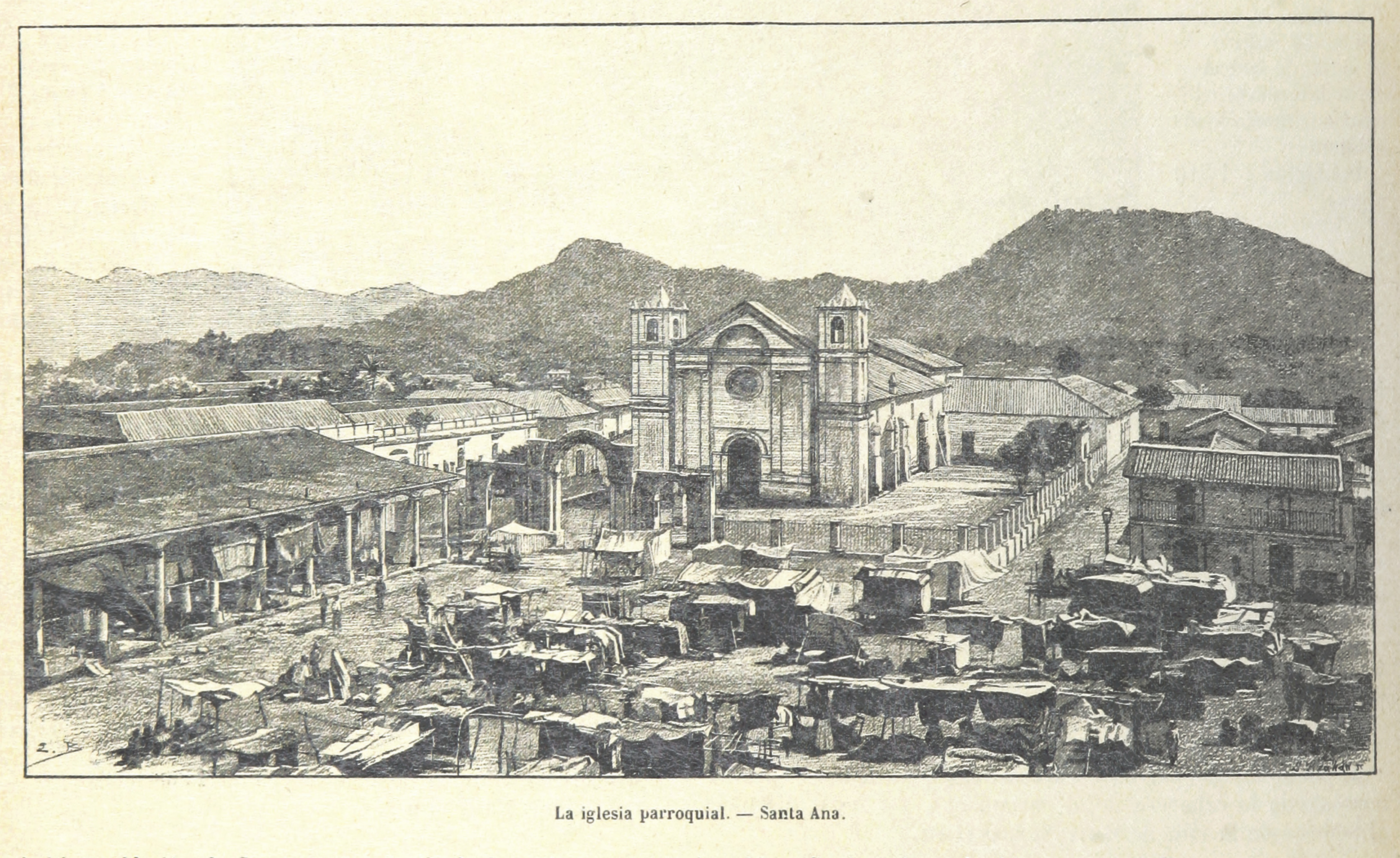 Grabado de 1890 en el que se muestra la parroquia central de Santa Ana y otras edificaciones existentes en ese entonces, así como el extremo nororiente de la plaza pública de la ciudad.